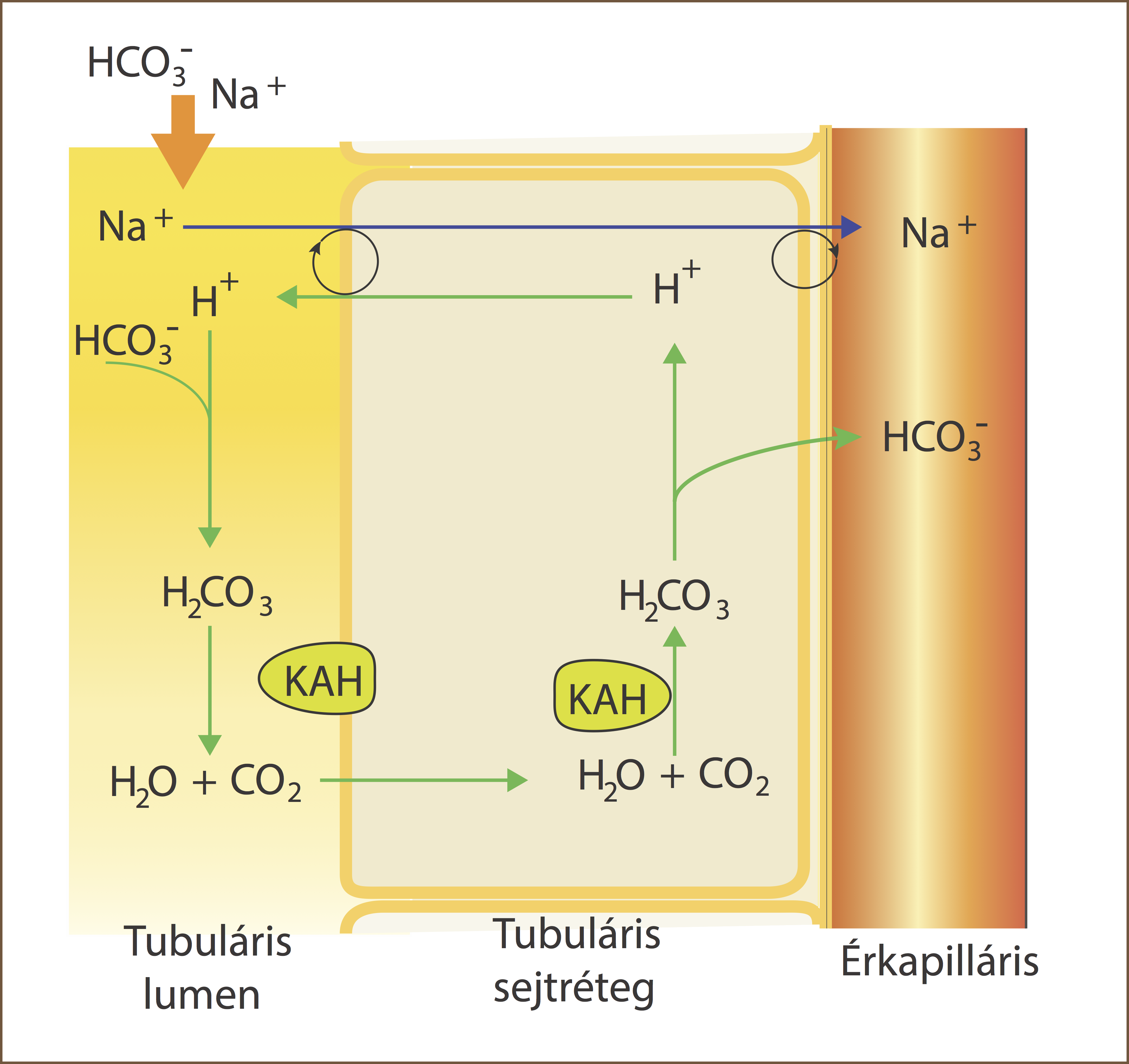 Carbonic anhydrase in kidney